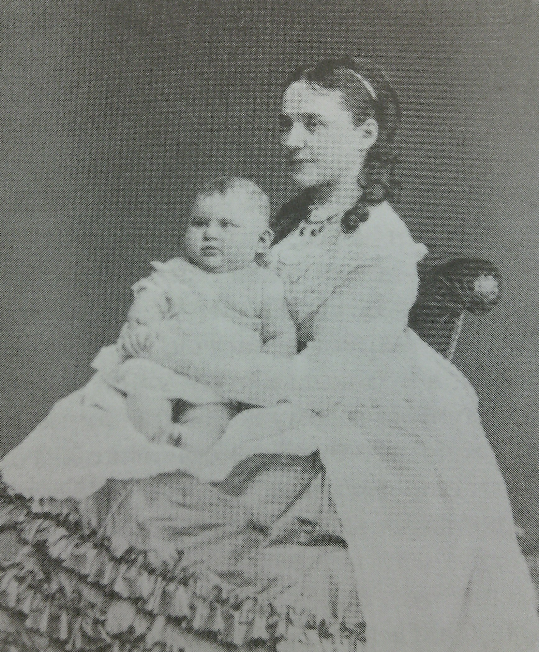 Баронесса Мария Васильевна Мейендорф, ур. Олсуфьева (1841—1920) с дочерью Марией.